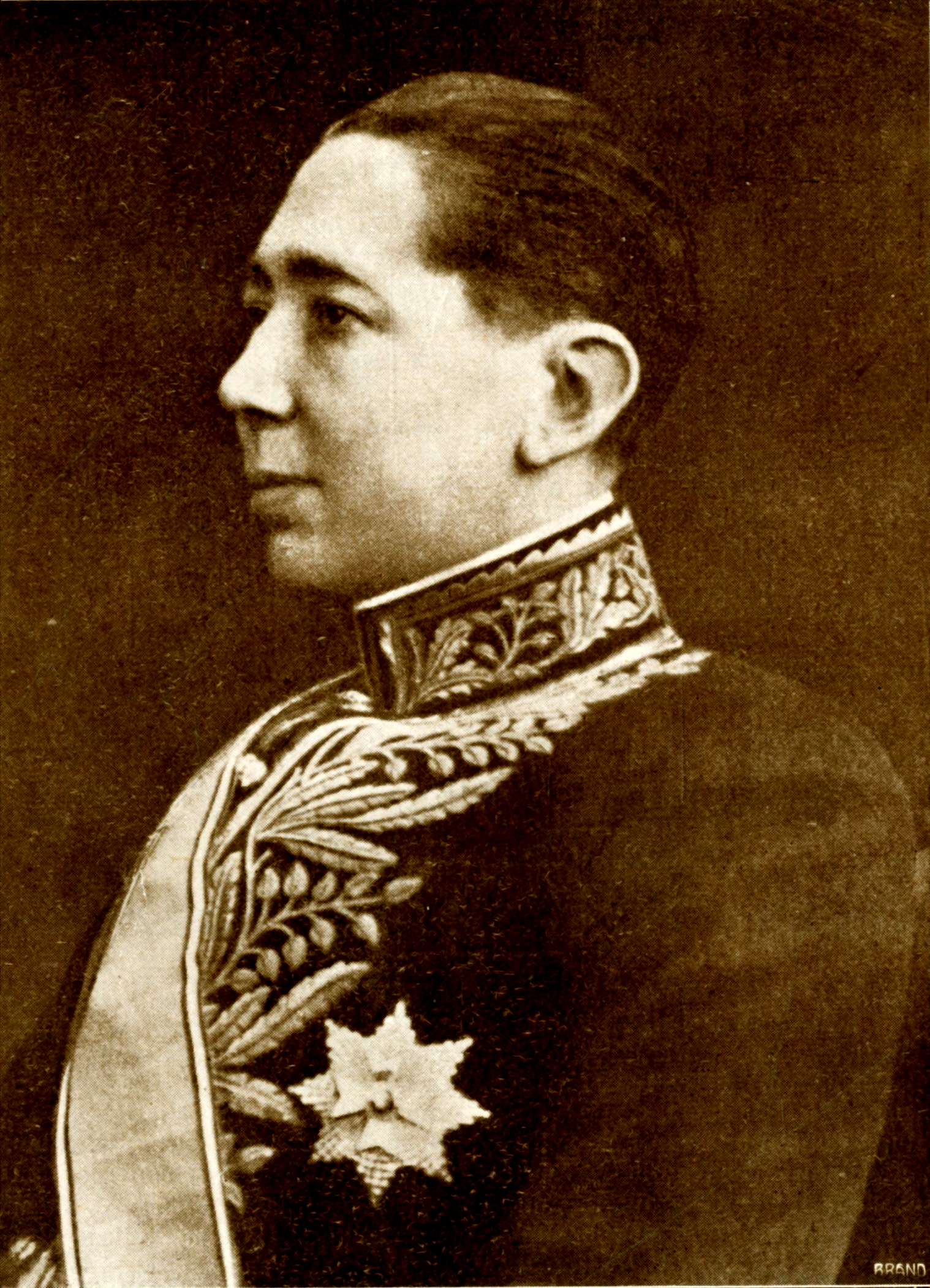 Nicolae Titulescu - Ministrul României la Londra - Prim Delegat român la Societatea Națiunilor